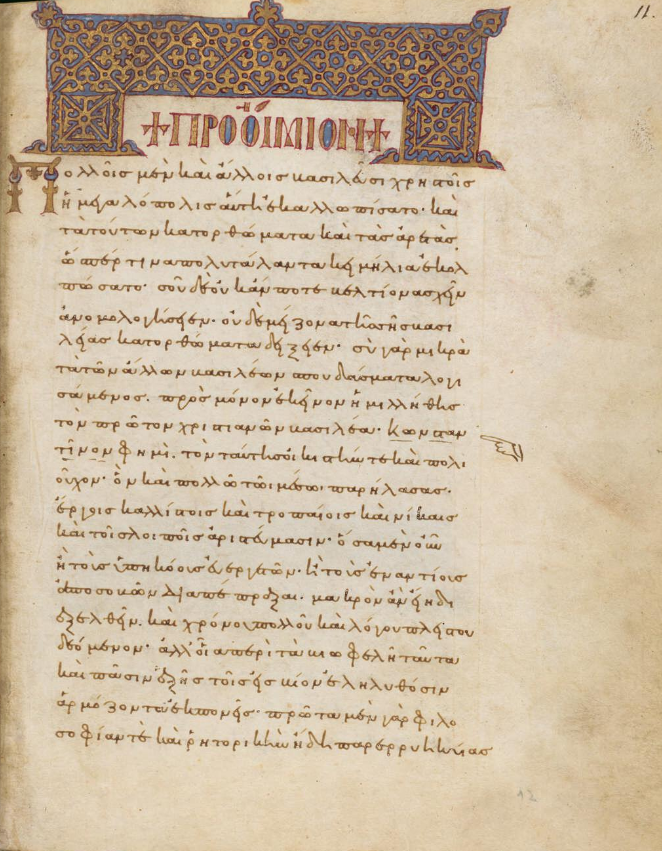 Geoponica Opening preface MS.Laur.Plut.59.32 f.12r